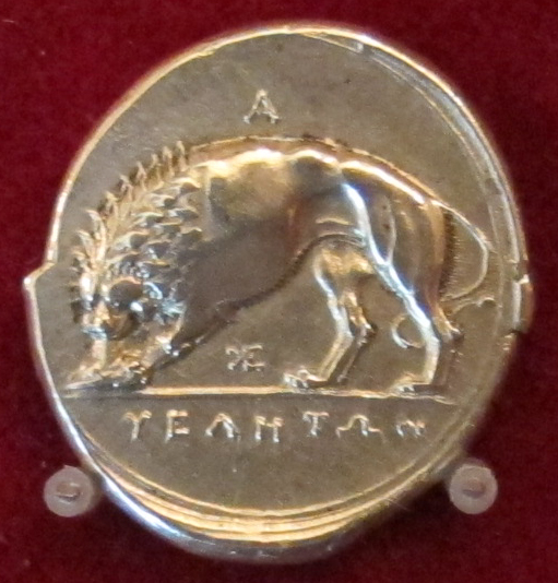 Velia, leone che mangia preda, argento, IV sec. ac.